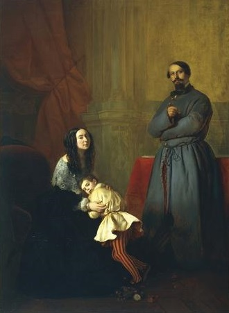 La famiglia di Antonio Francischelli, olio su tela, Galleria Oddi Ricci, Piacenza